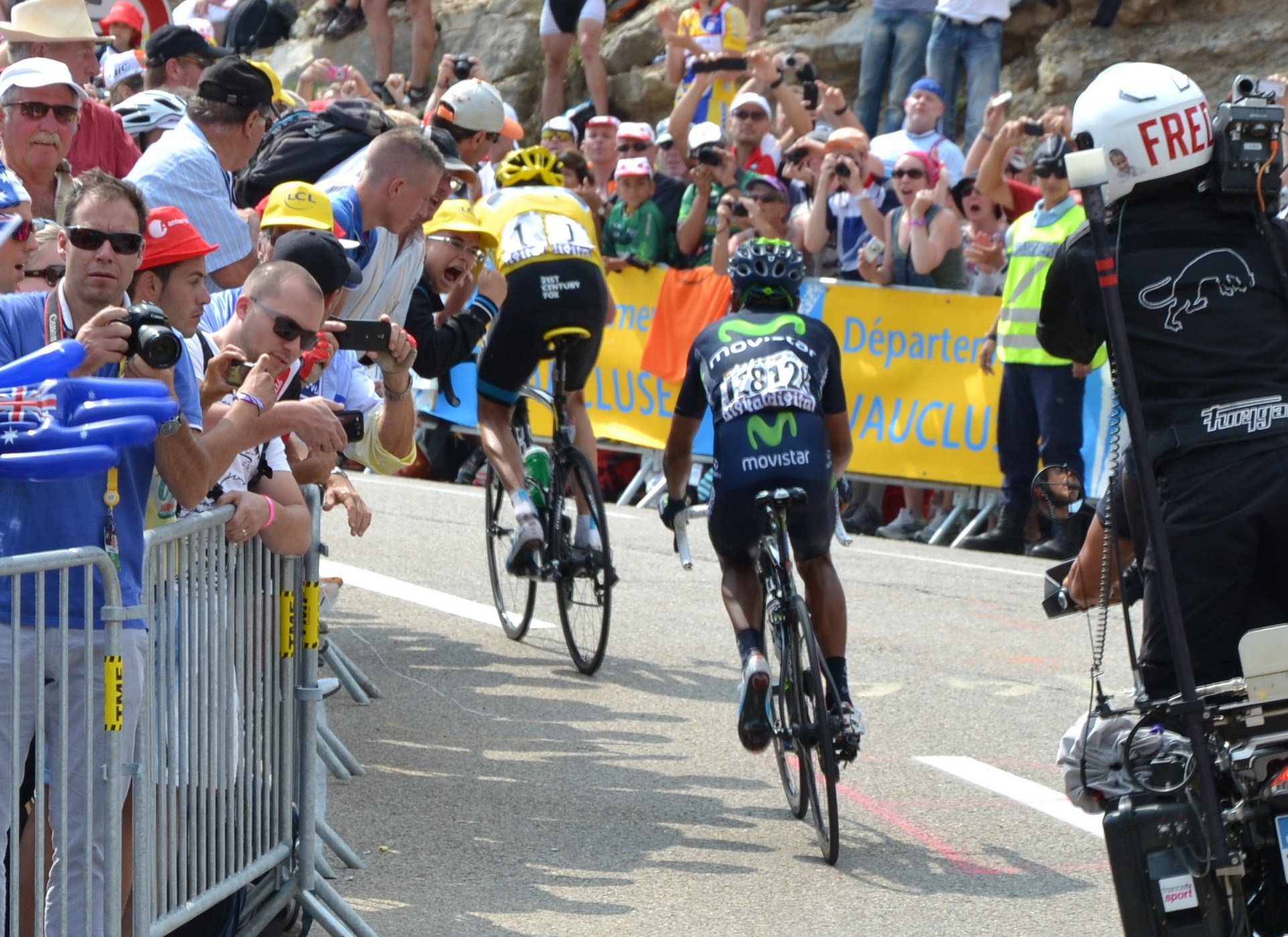 Christopher Froome et Nairo Quintana, au Chalet Reynard, Mont Ventoux, lors de la 15ème étape du Tour de France 2013